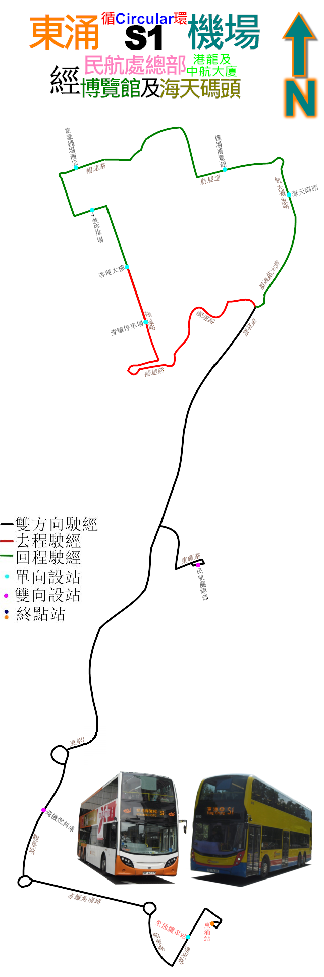 中文（香港）: 機場巴士S1線的走線圖